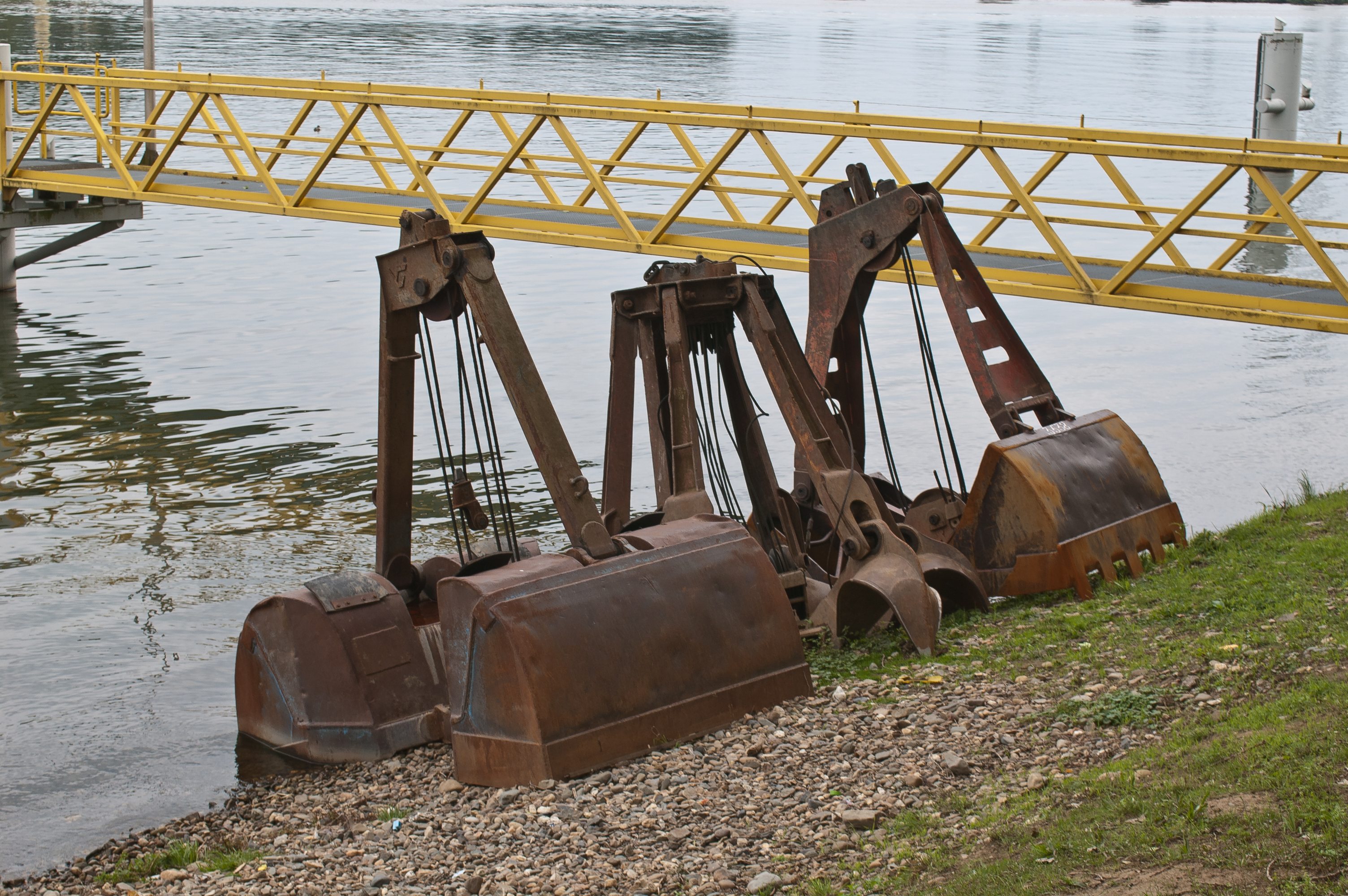 Drei verschiedene Greifer für einen Seilbagger, abgestellt am Ufer der Maas in der Nähe von Heel, Niederlande